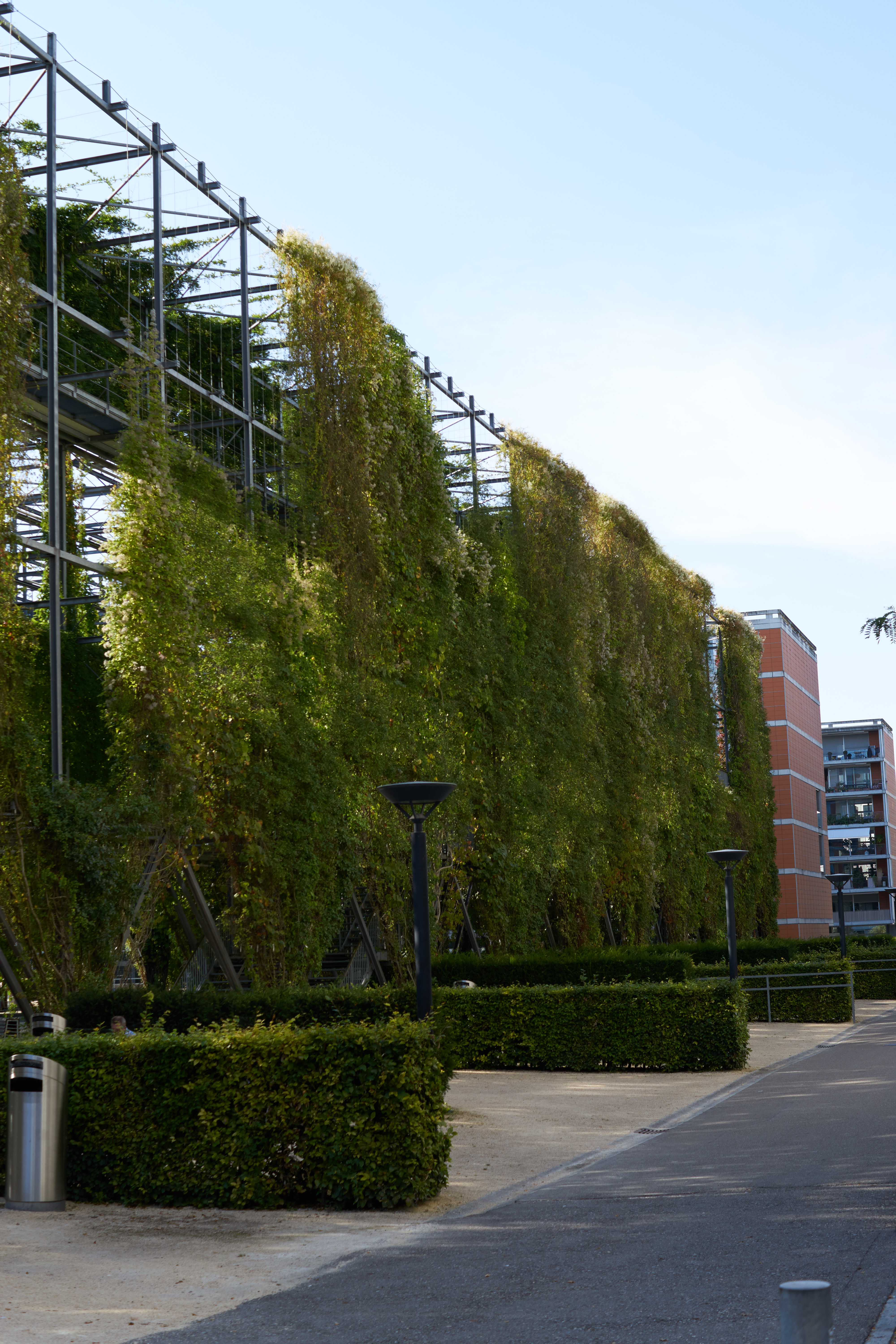 MFO-Park in Zürich. Aufgenommen im 2016